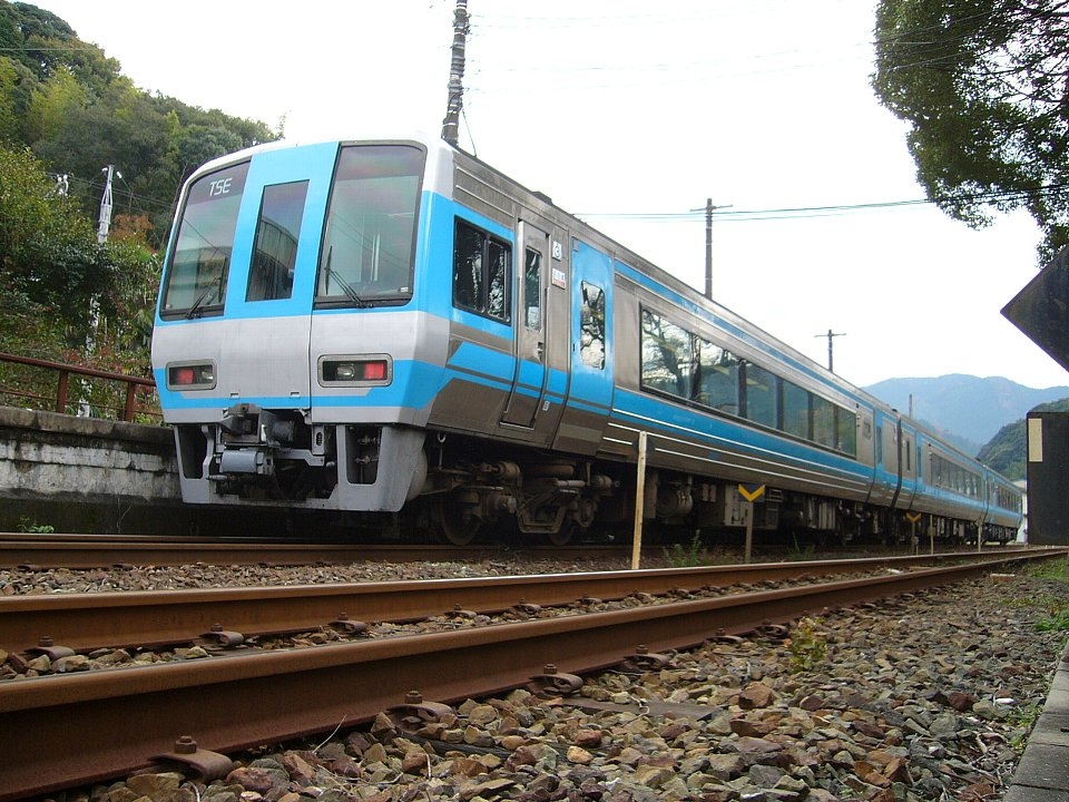 JR四国2000系気動車 TSE「宇和海9号」 予讃線双岩駅にて